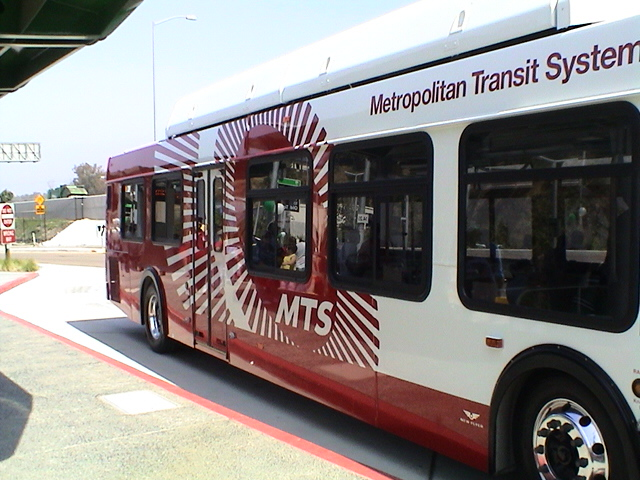 Nueva flota de buses del Sistema Metropolitano de Tránsito.